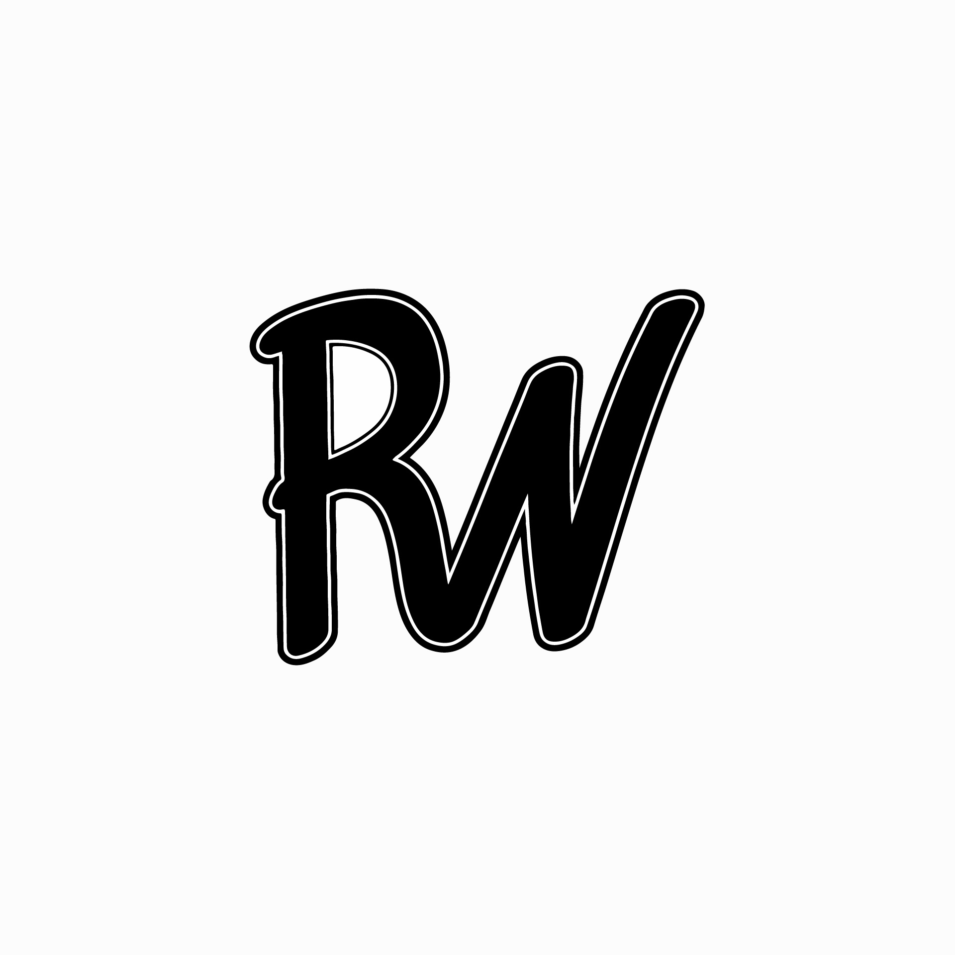 Logo rasmi Rewolf